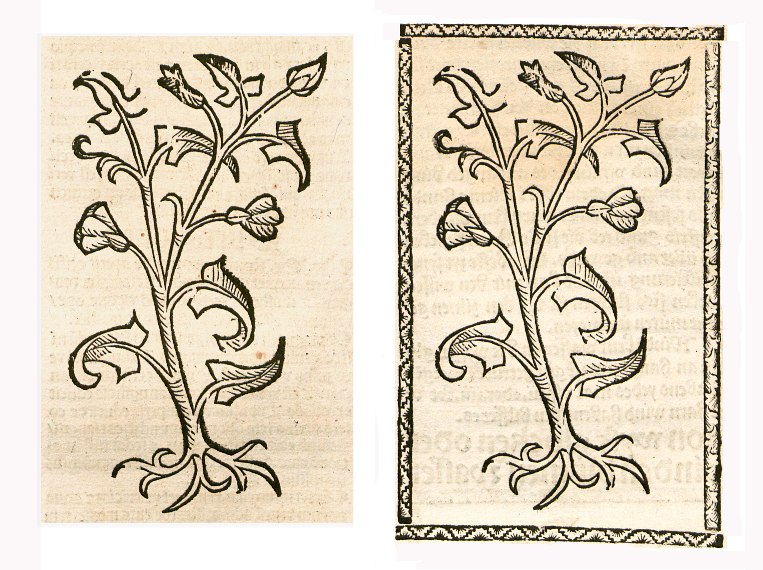 Abbildung von: Winden Krut (Convolvulus)